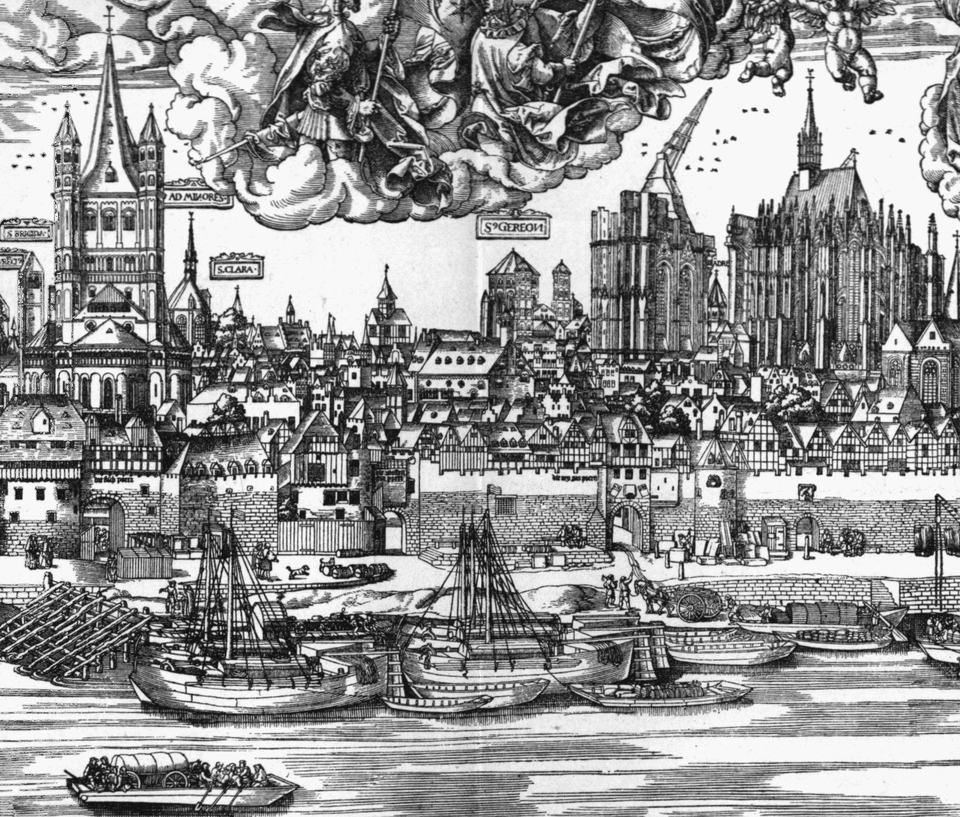 Holzschnitt: Woensam Niederländer Schiffe (1531)